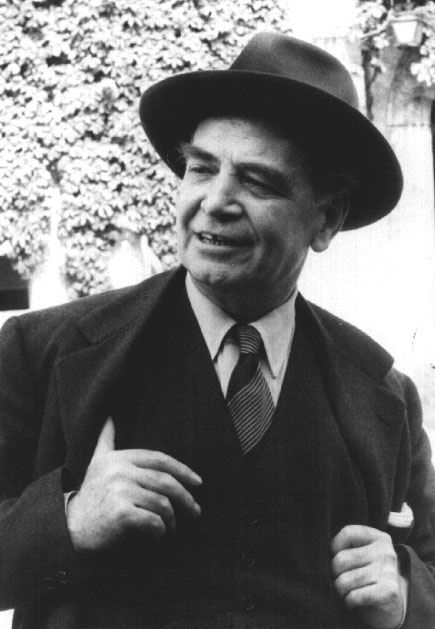 Template:Ill, banchiere italiano